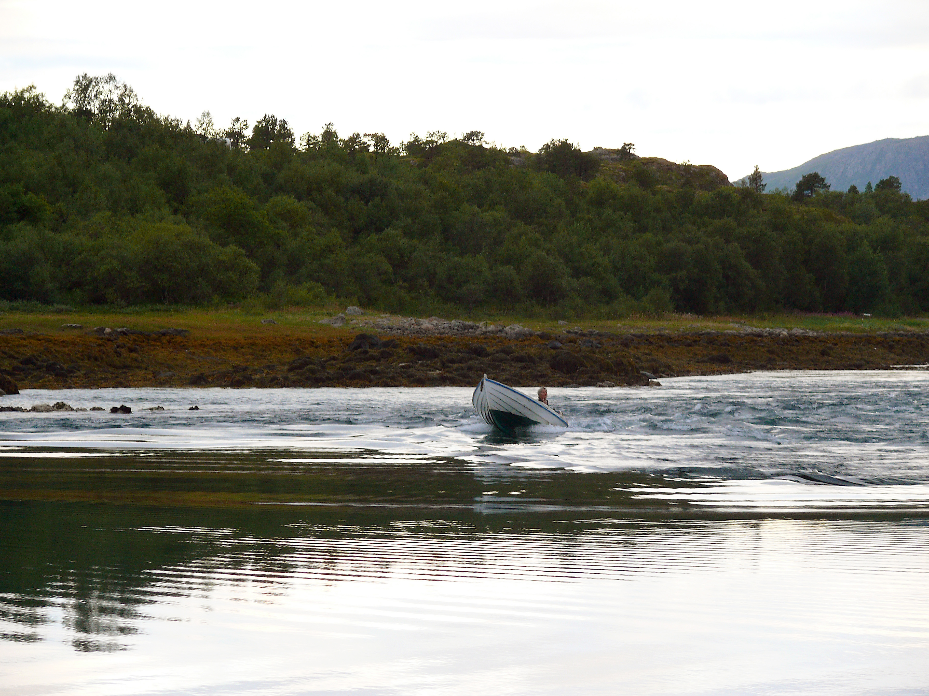 Kjærfjordstraumen for "utgående"